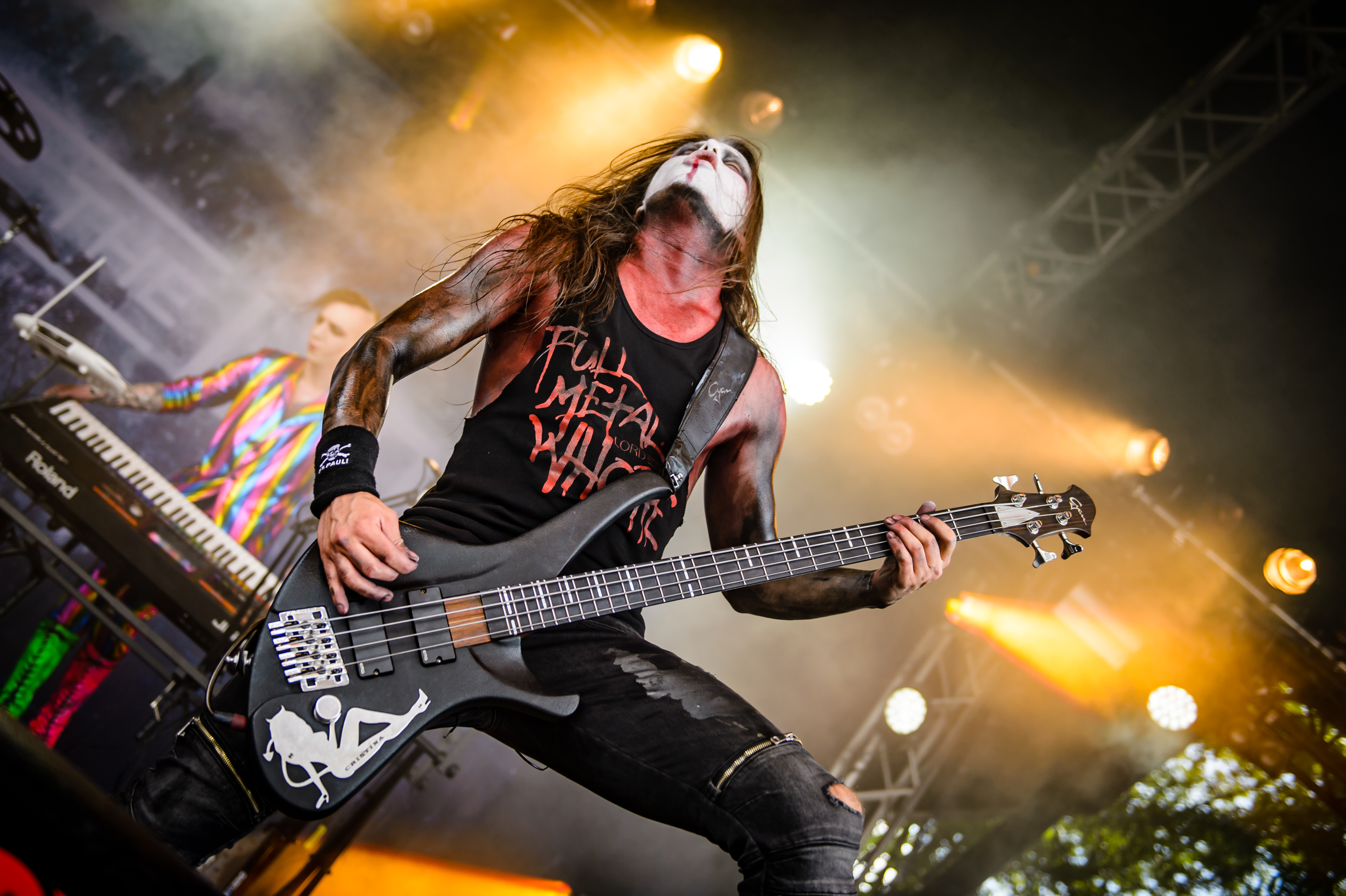 'Amphi Festival 2017; Tanzbrunnen Köln': 'Lord of the Lost '